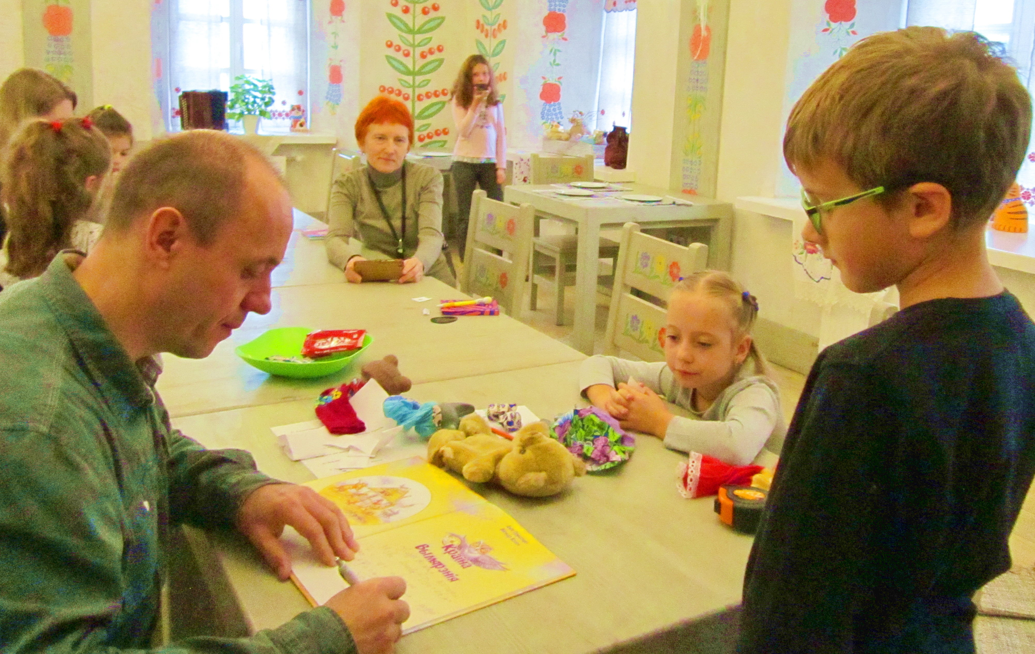 Пісьменнік Алег Грушэцкі. Раздача аўтографаў падчас прэзентацыі кнігі «Краіна Вымярэнія» на сямейных развіццёва-забаўляльных курсах беларускай мовы «Мова Нанова Дзеткам»